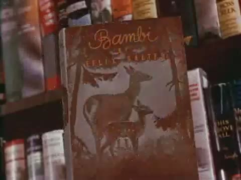 Imatges del tràiler de la pel·lícula "Bambi". Els tràilers de les pel·lícules publicats abans de 1964 als Estats Units es troben en domini públic